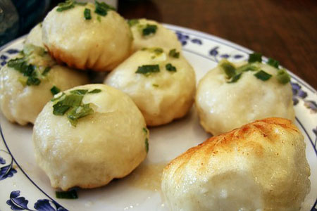 生煎饅頭（米国カリフォルニア州ロサンゼルス郡サン・ガブリエルの点心専門中華料理店「J & J Restaurant」）